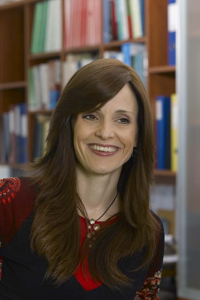 פרופסור יונינה אלדר, הטכניון